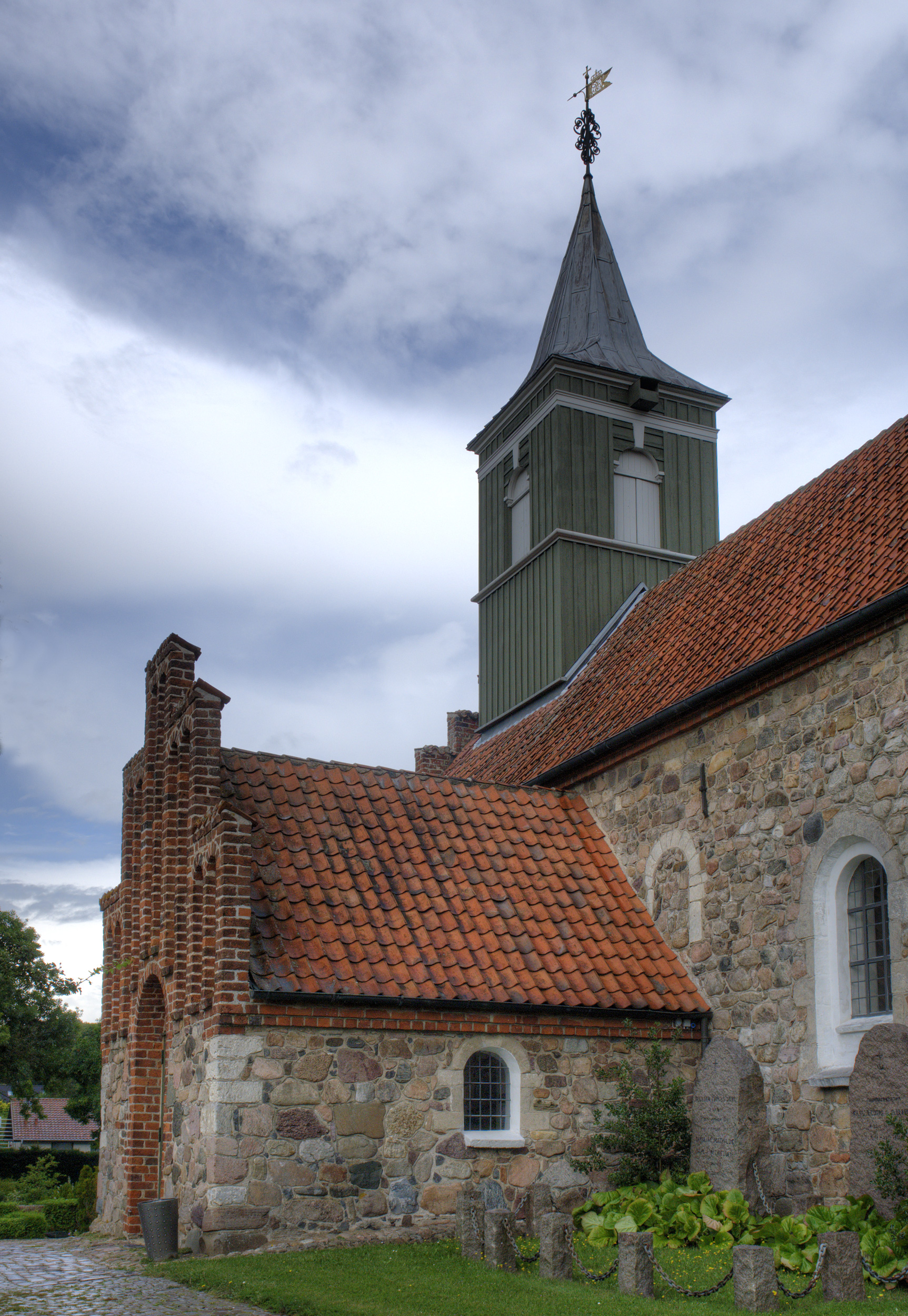 Kirche von Nødebo, Dänemark (Nord-Seeland).